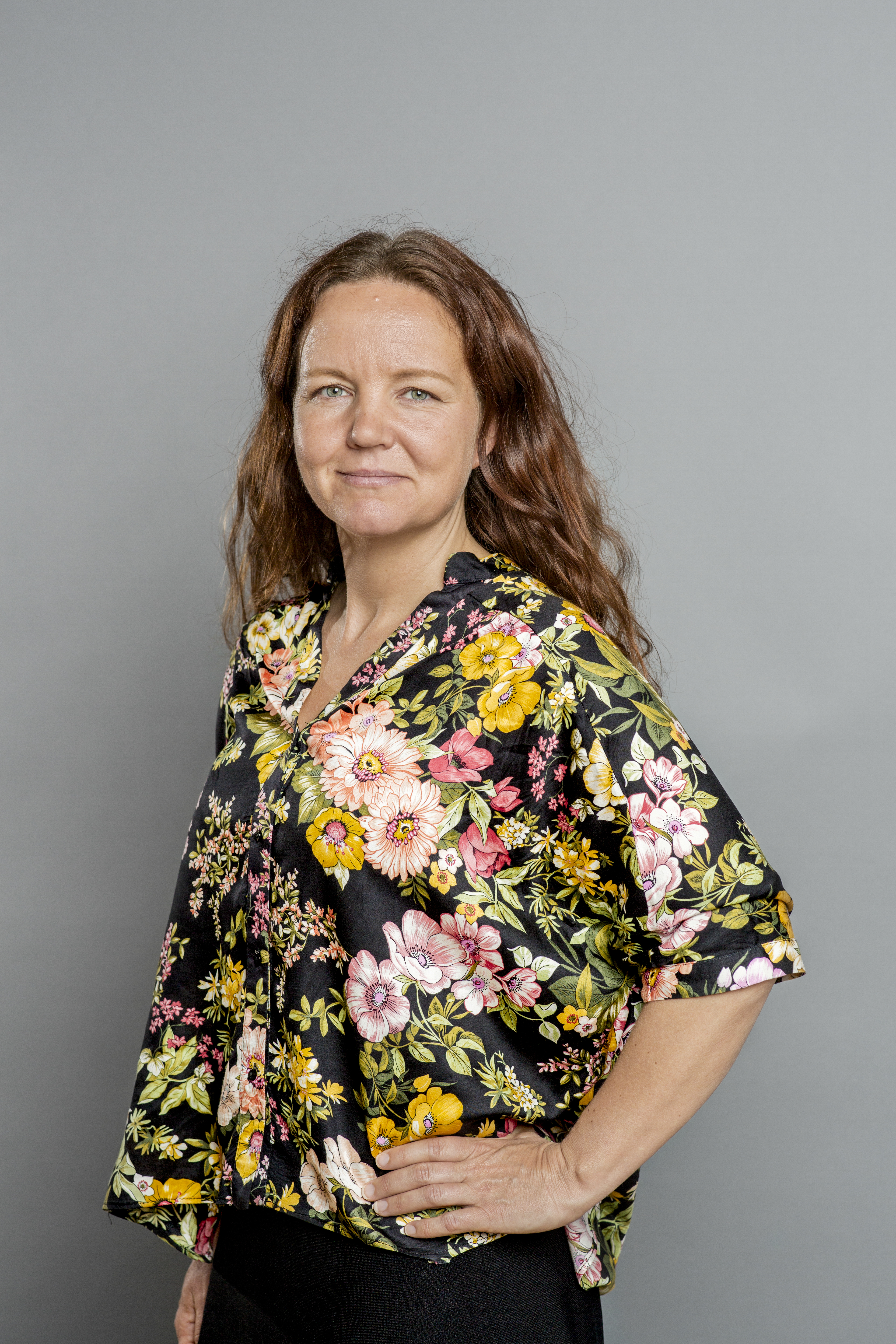 Yasmine Posio. Vänsterpartiet. 2018.